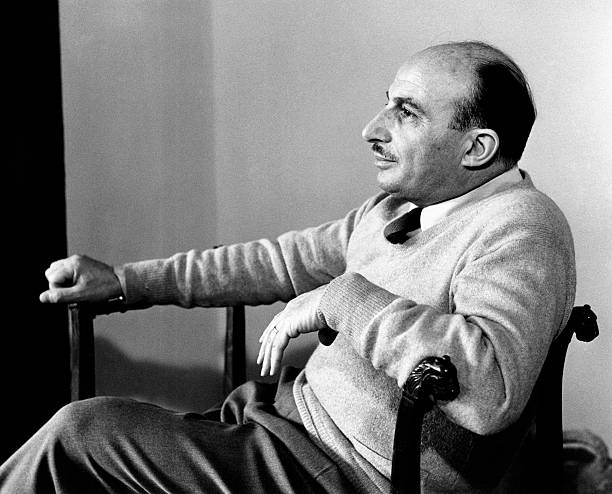 Carlo Bernari (1909 - 1992)